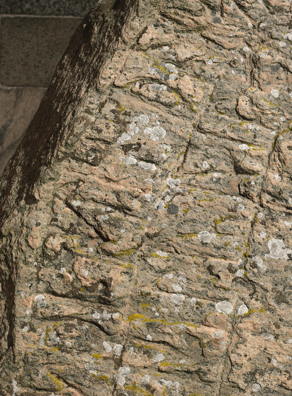 Foto: nationalmuseet ved Roberto Fortuna